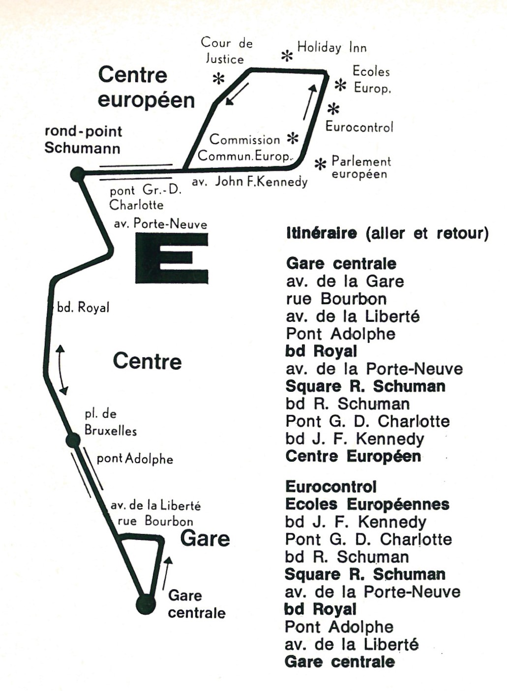 Streck vun der AVL-Linn E (1973)